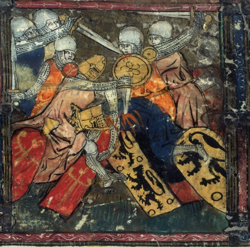 Bataille